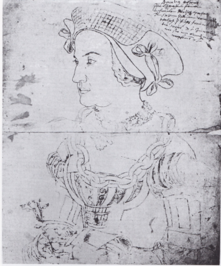 Amalia von der Pfalz (1490-1525), Kohlezeichnung nach A. Dürer aus dem Visierungsbuch Herzog Philipps II. von Pommern, ehemals Pommersches Landesmuseum Stettin